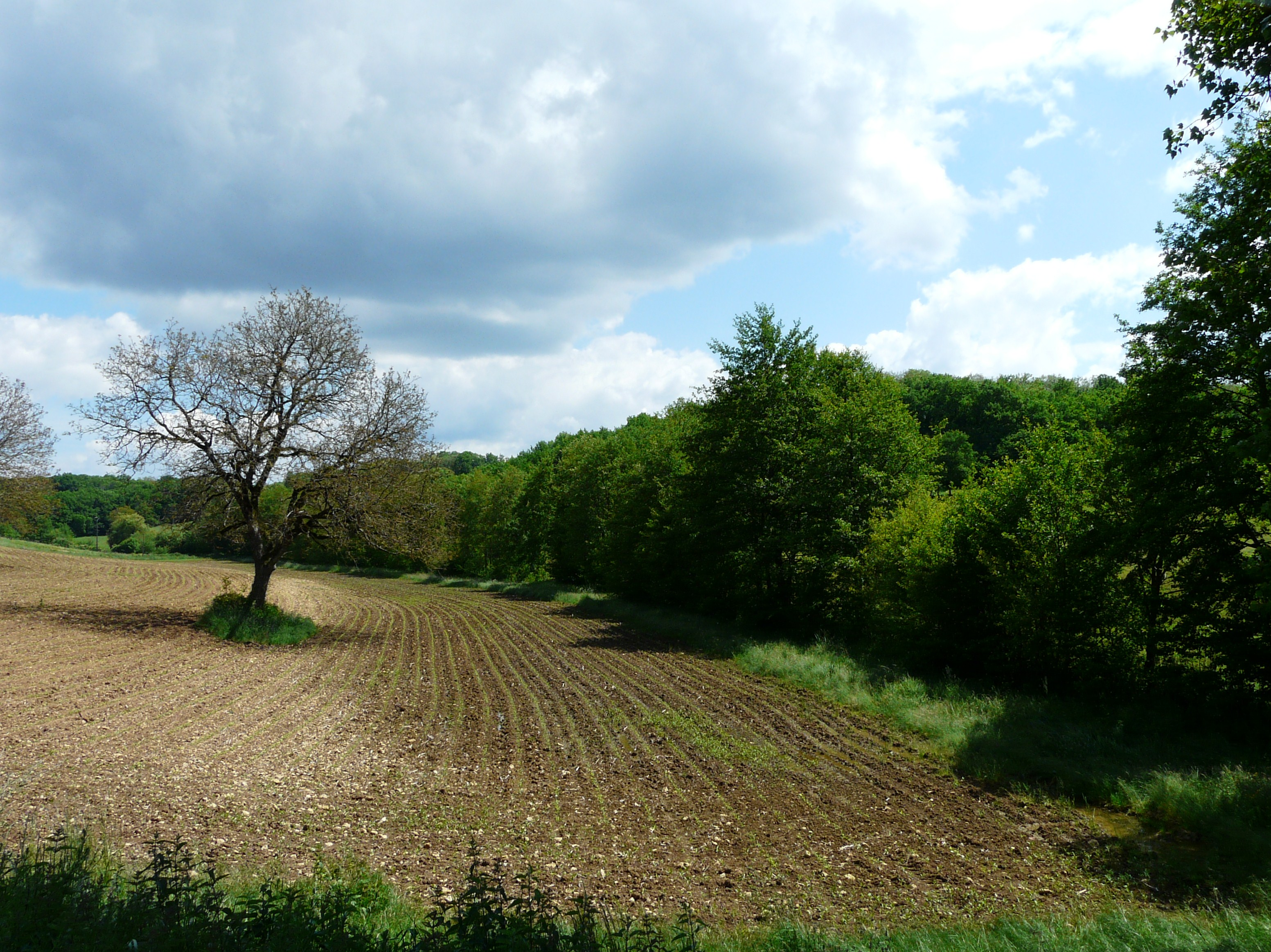 La vallée de la Crempse à Beauregard-et-Bassac, en amont du pont de la route départementale 38, Dordogne, France.